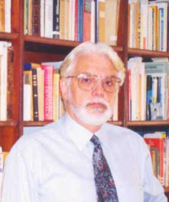 Retrato Alejandro Lanoël